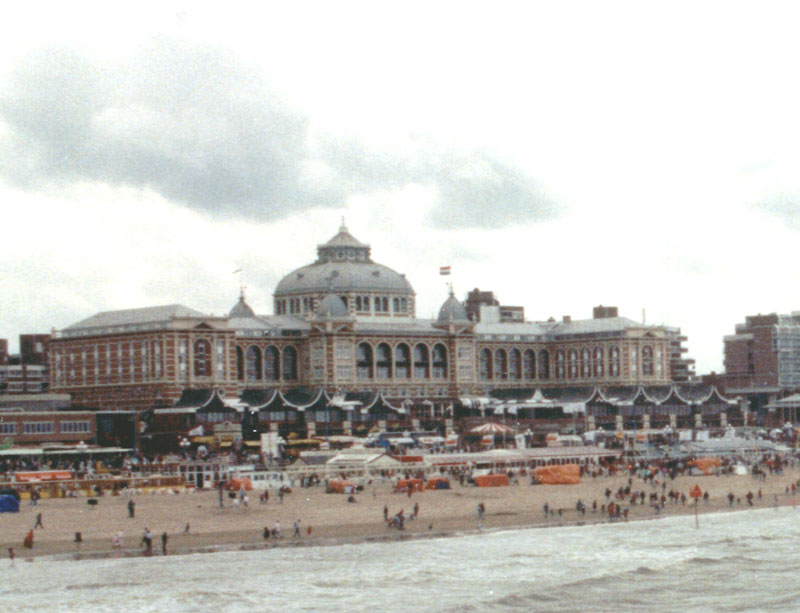 Eigen foto van het Kurhaus